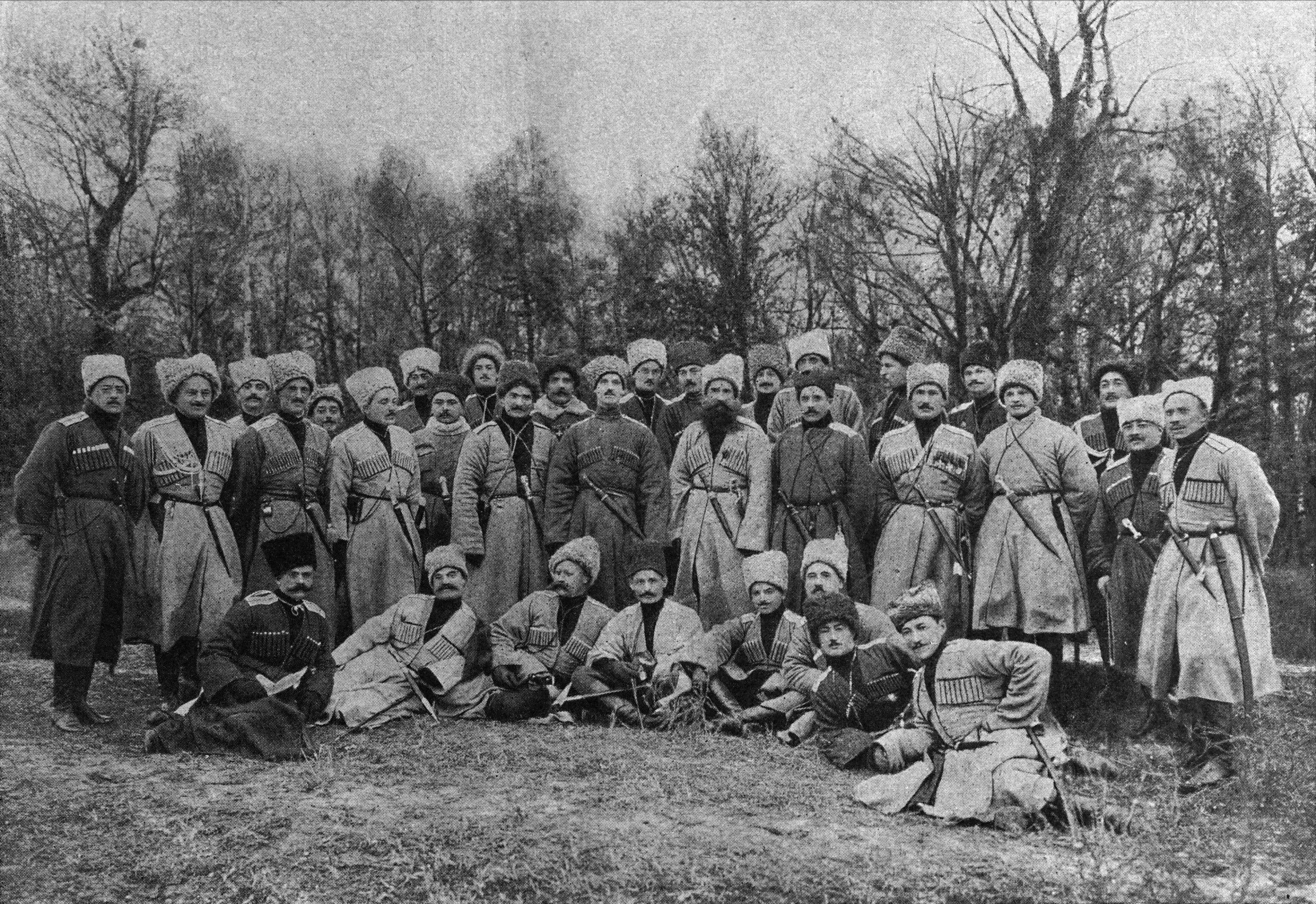 Великий князь Михаил Александрович среди офицеров 2-й бригады Кавказской туземной бригады.